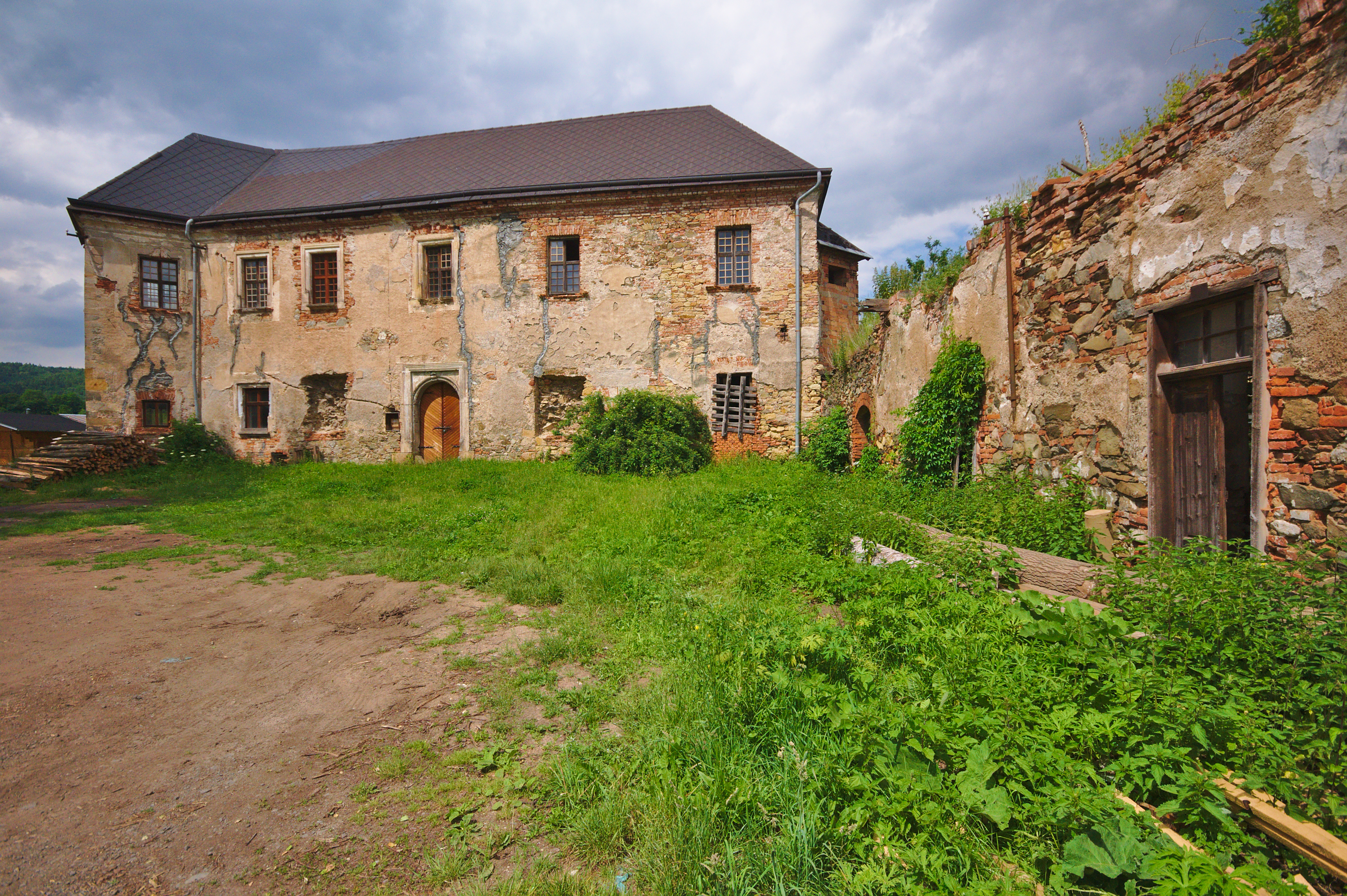 Zámeček Vranová Lhota, Vranová Lhota, okres Svitavy